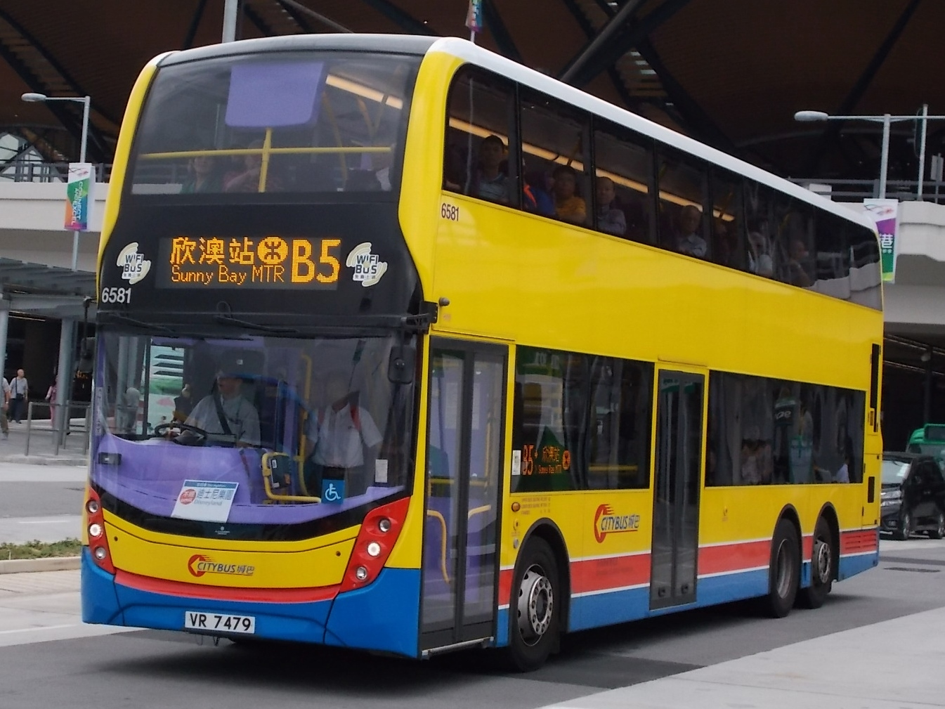 城巴B5線，剛駛離港珠澳大橋香港口岸總站前往欣澳站